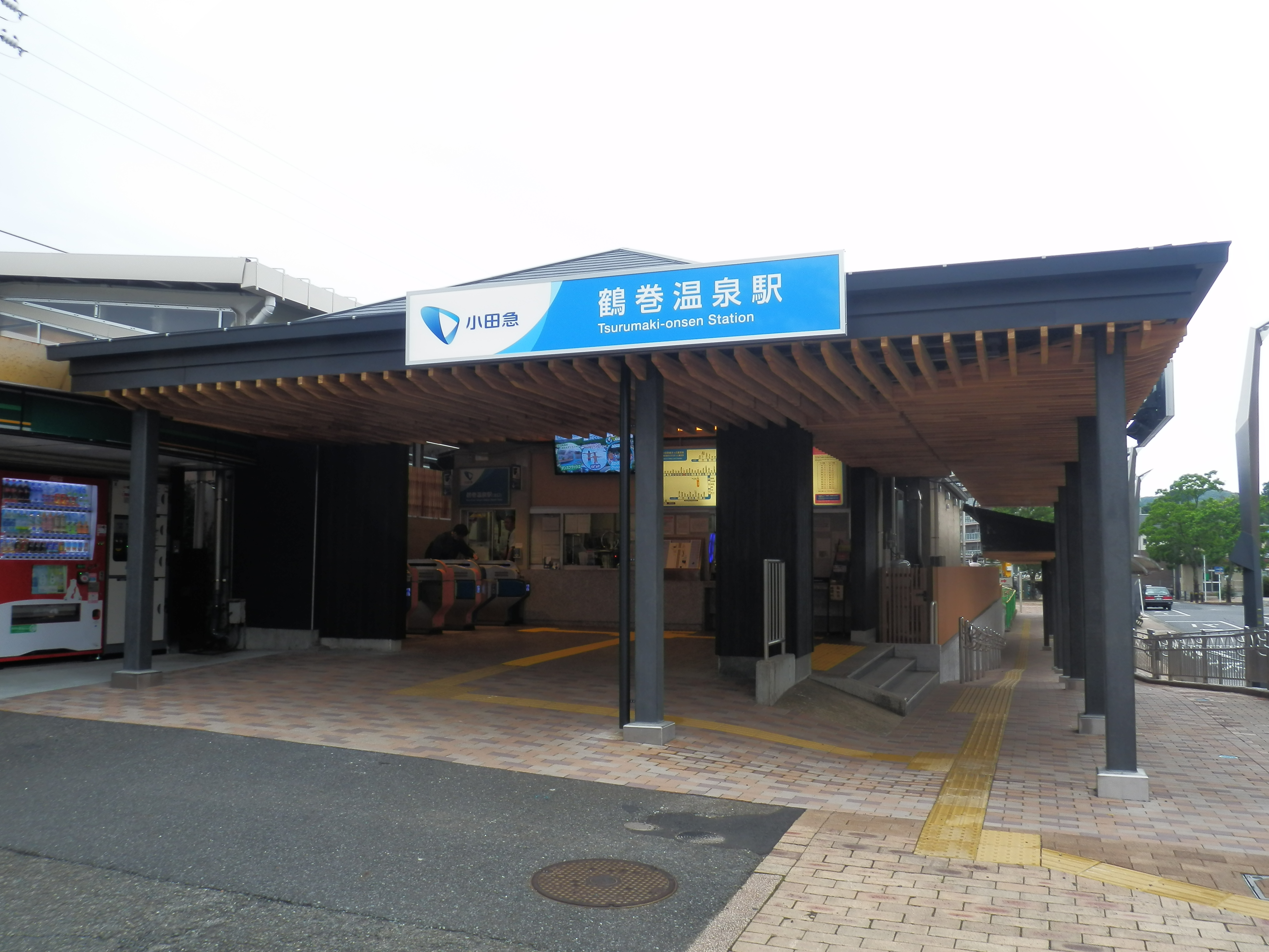 鶴巻温泉駅北口